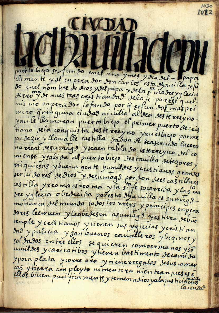 Descripción del Manuscrito Nueva Crónica y Buen Gobierno de Felipe Huamán Poma de Ayala [1]